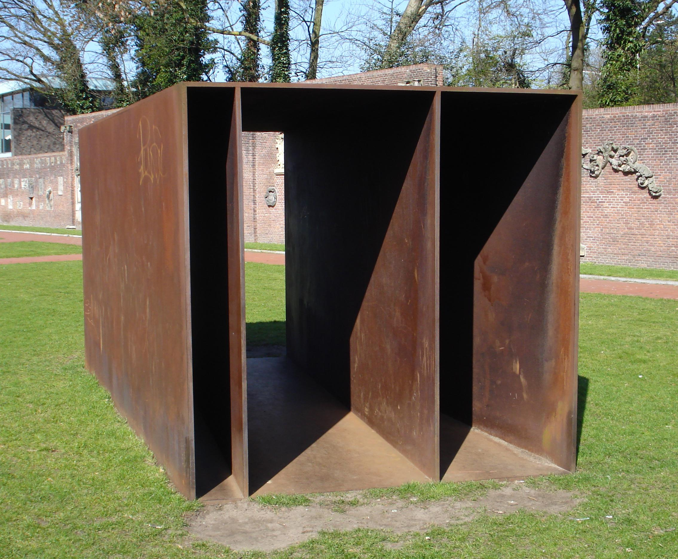 Den Haag, Stadhouderslaan, gemeentemuseum. Kunstwerk "Untitled object" van Donald Judd. The Hague/The Netherlands.